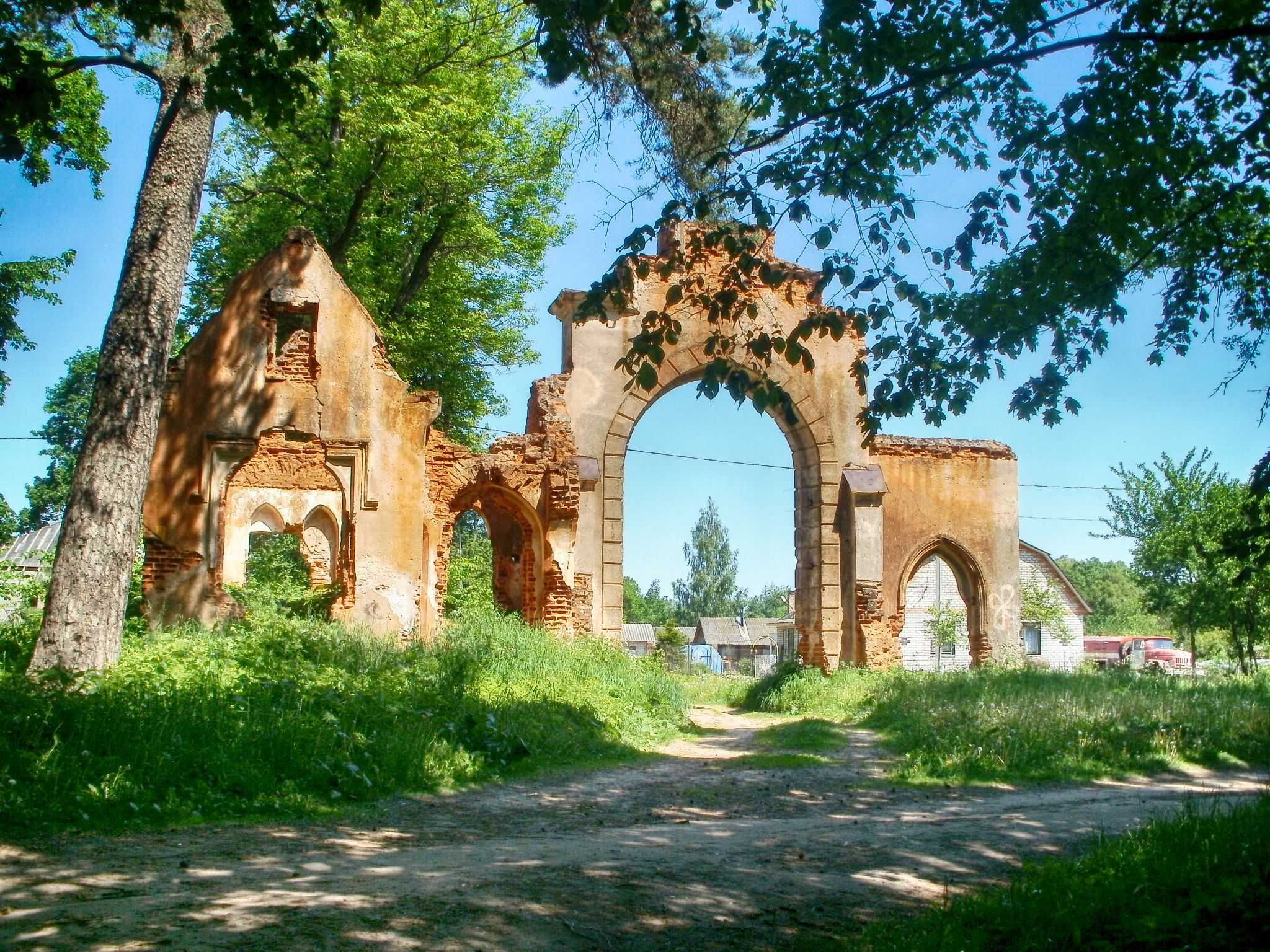 Беларуская (тарашкевіца): Ансамбль былой сядзібы: жылы дом скарбніца флігель паўночная ўязная брама гаспадарчыя пабудовы рэшткі Сьвята-Мікалаеўскай царквы валун воданапорная вежа парк альтанка. в. Станькава